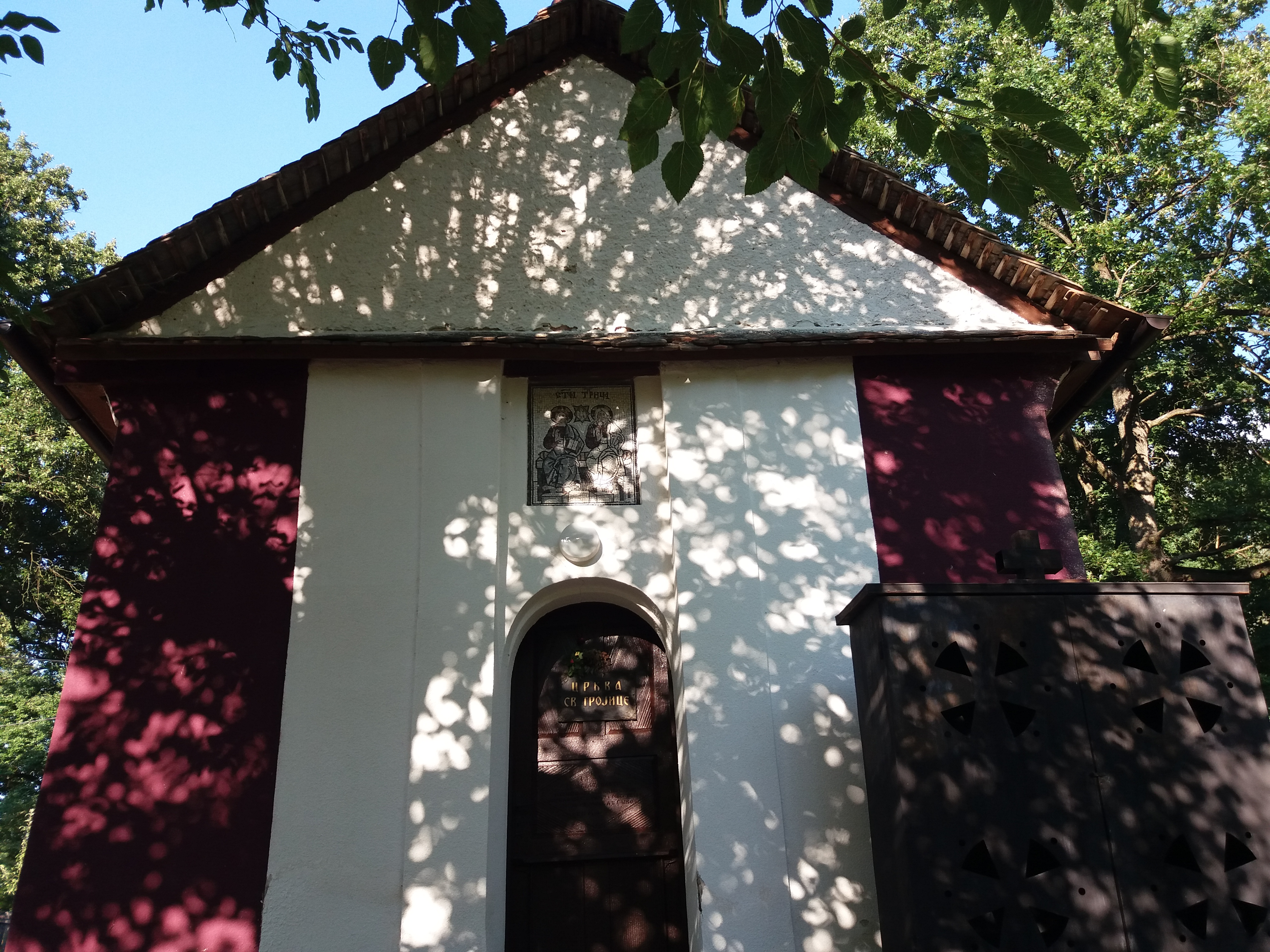 Srpski (latinica): Crkva Svete Trojice, Cerovac